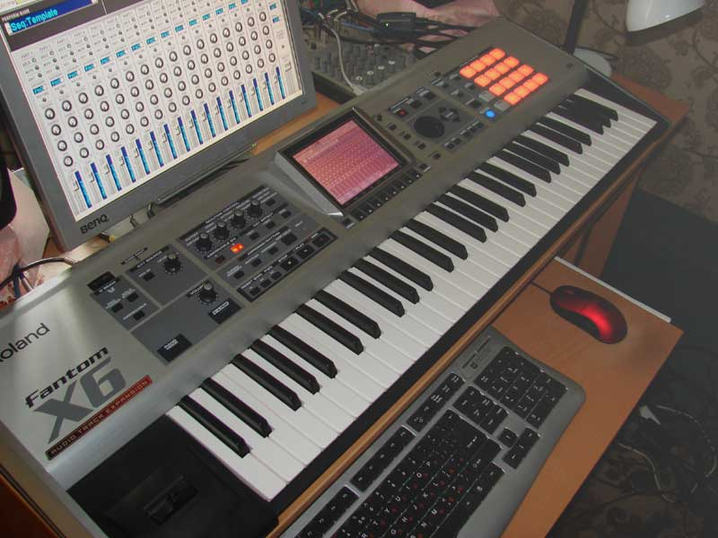 Roland Fantom X6 в домашней студии